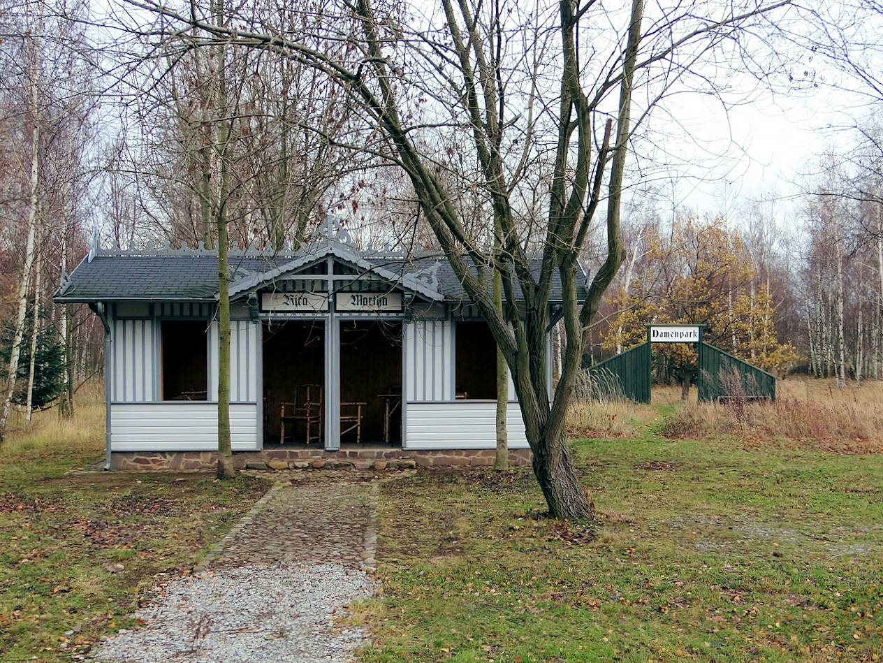 Nachgebauter Pavillon der ehemaligen Jungborn-Heilanstalt auf dem gleichnamigen gelände im Eckertal bei Stapelburg.